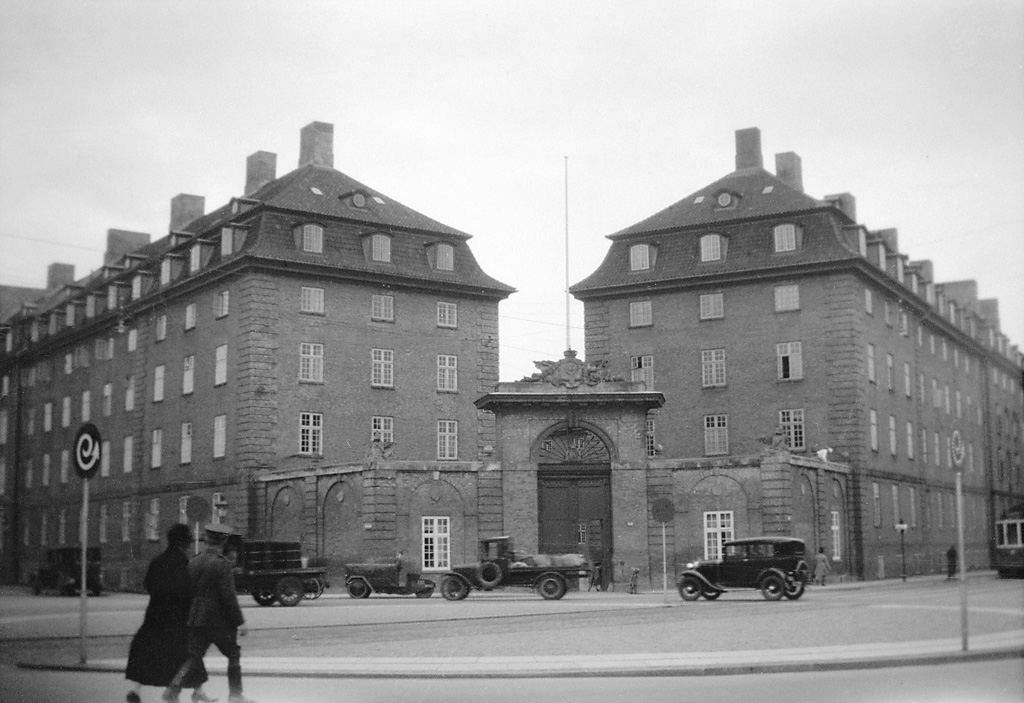 Sølvgade Barracks in Copenhagen, built in 1765-1771, designed by Nicolas-Henri Jardin. A military barrracks at Sølvgade 40, that in 1926 became headquarters for DSB, the Danish State Railways. Sølvgades Kaserne i Köpenhamn, byggda 1765-1771, ritade av Nicolas-Henri Jardin. En militärförläggning på Sølvgade 40, som 1926 blev huvudkontor för DSB, danska statsjärnvägen. Location: København, Själland, Sjaelland (Zealand), Denmark, Danmark Photograph by: Berit Wallenberg Date: 28.07.1930 Format: Film Persistent URL: Read more about the photo database (in english)